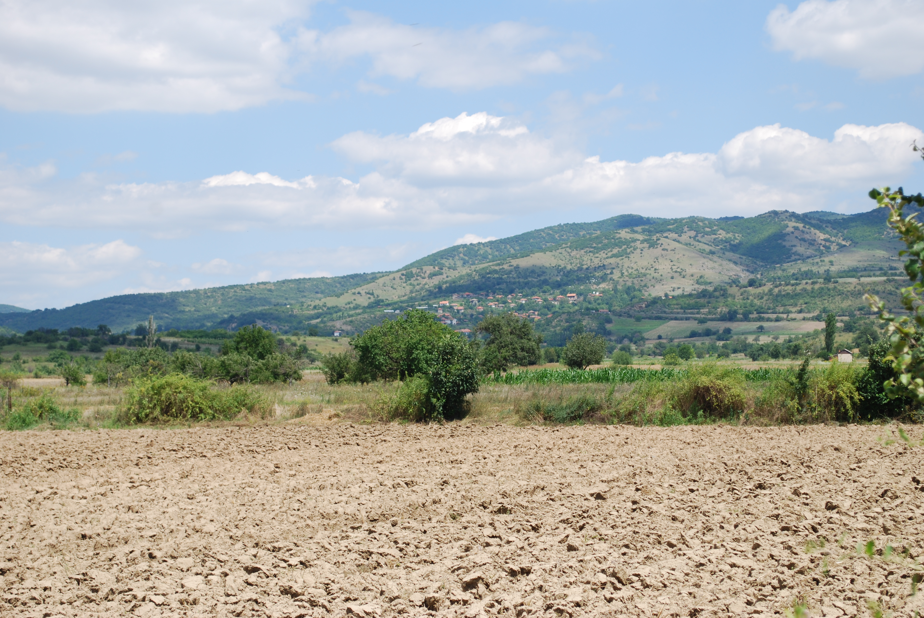 Поглед на селото Винце, кумановско, Македонија